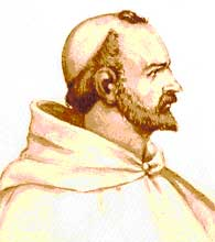 Pope Lucius III